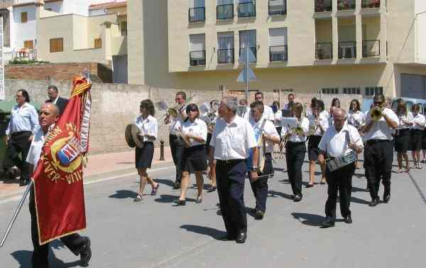 Banda de Musica de Viver